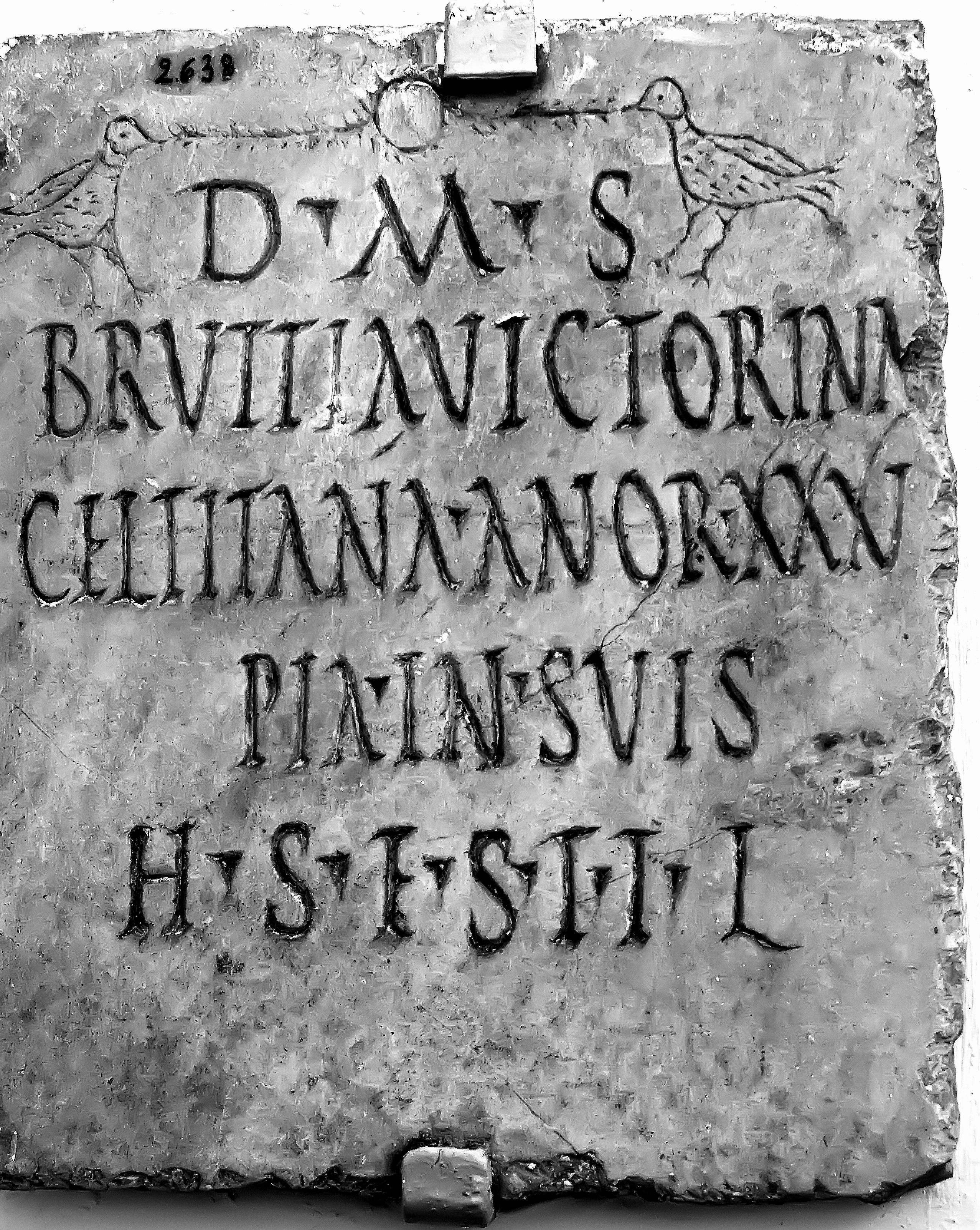 Inscripción conservada en el Museo Arqueológico y Etnológico de Córdoba procedente de Peñaflor (Córdoba). CILA 2-1, 177: D(is) M(anibus) s(acrum) / Bruttia Victorina / Celtitana annor(um) XXXV / pia in suis / h(ic) s(ita) e(st) s(it) t(ibi) t(erra) l(evis)